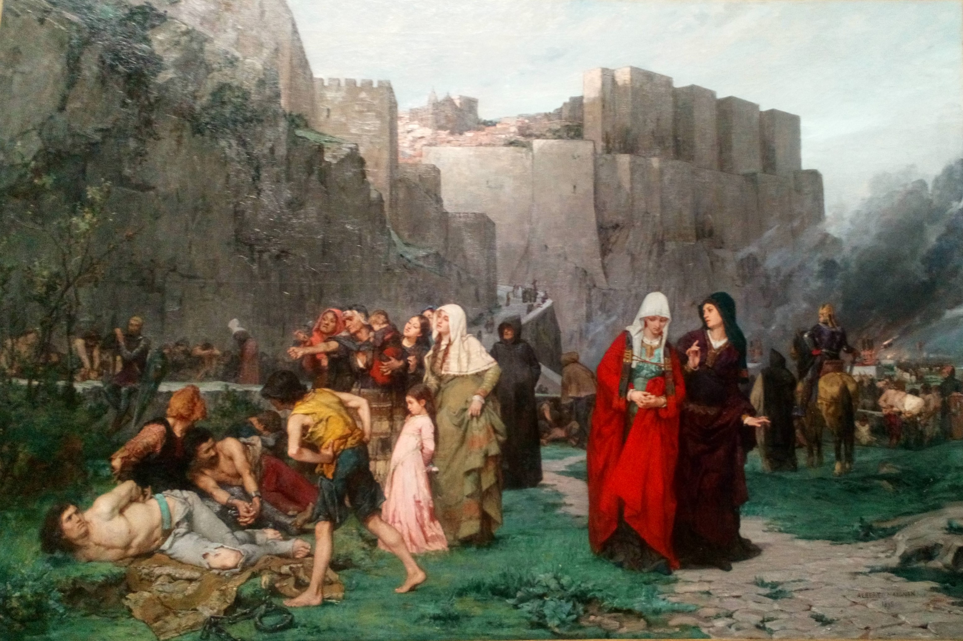 Musée de Picardie, L'Insulte aux prisonniers Episode de la croisade contre les Albigeois en 1211 par Albert Maignan (1875) 1